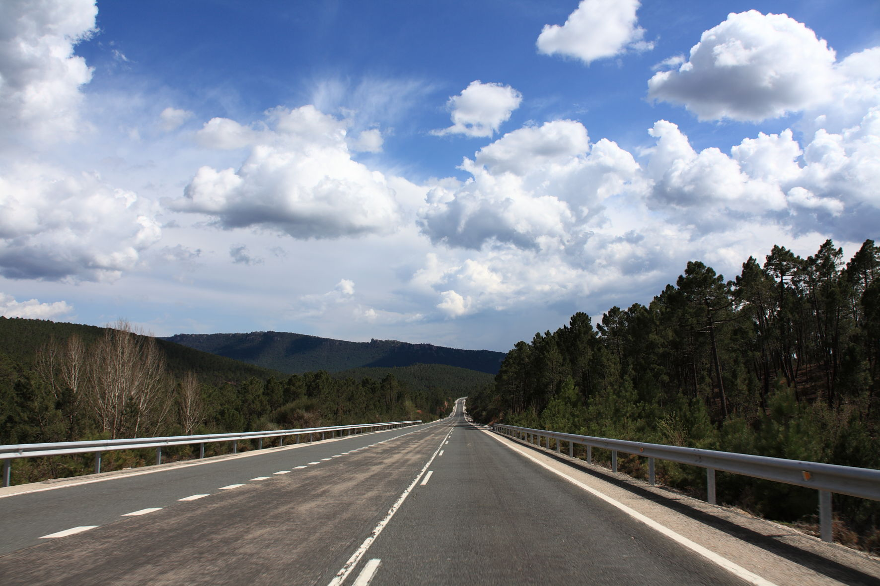 Carretera Nacional 420 en Pajaroncillo, 2010